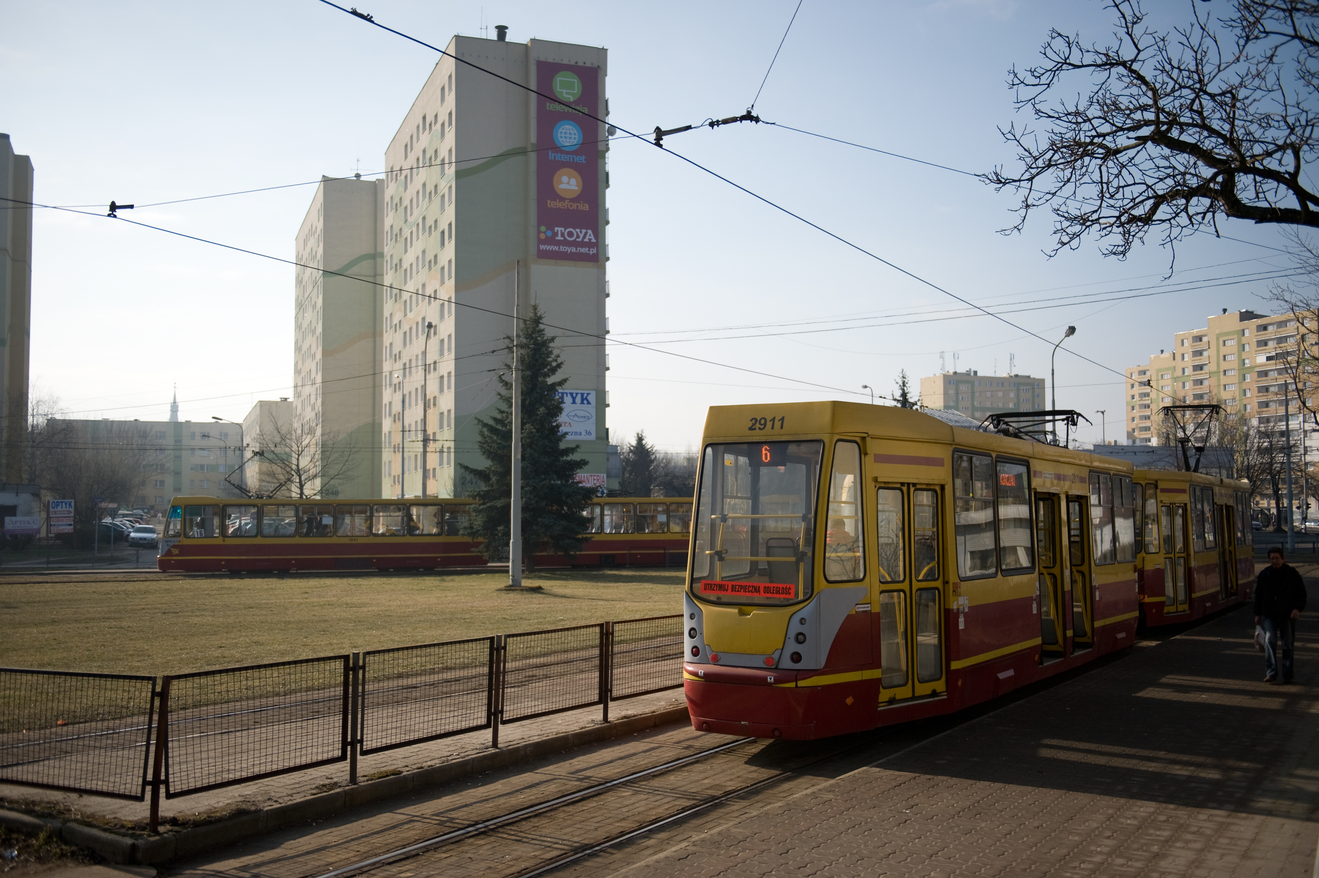 Tramwaje na krańcówce przy ulicy Kurczaki w Łodzi